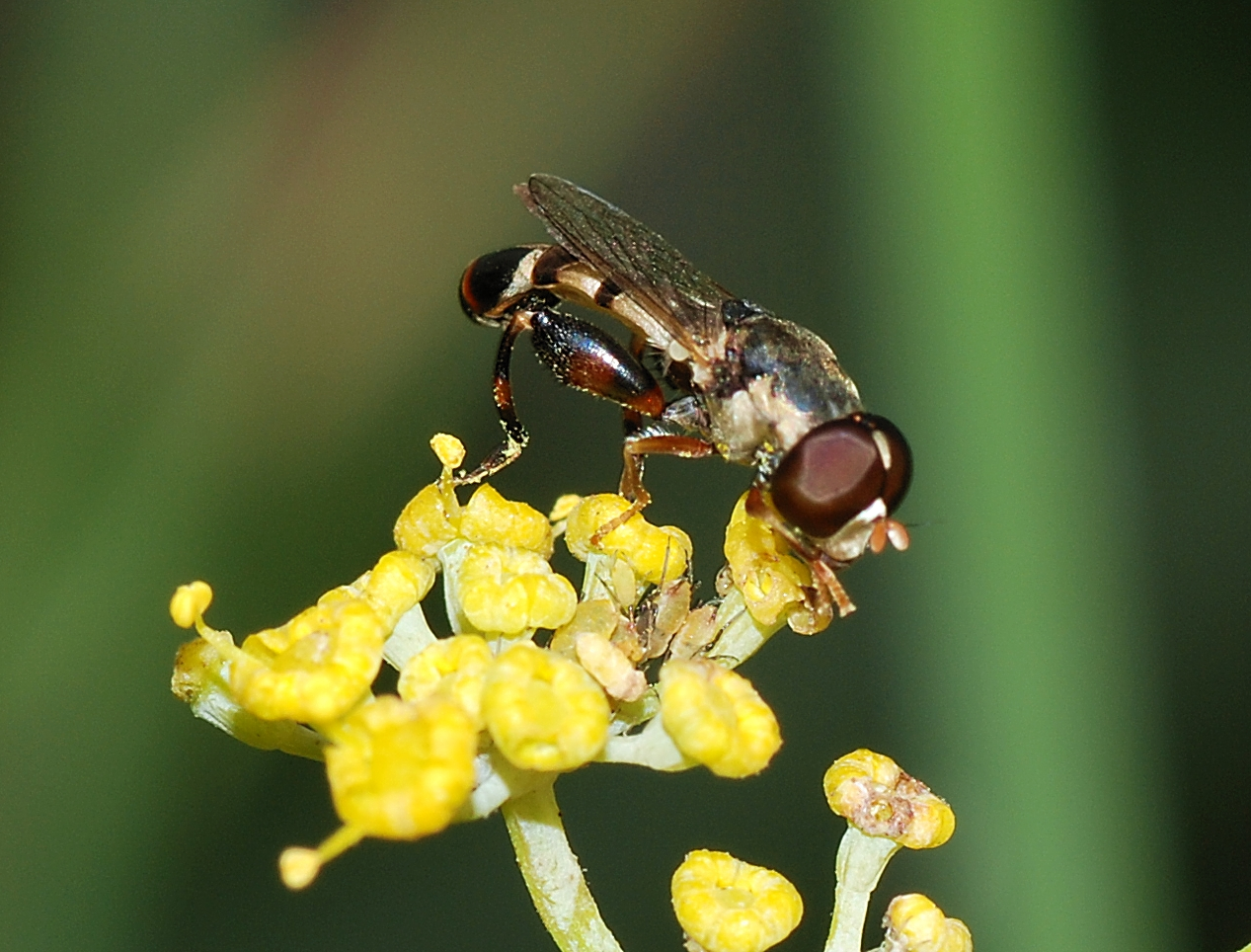 Hoverfly (Syritta pipiens)